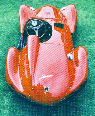 Bandini 750 sport siluro